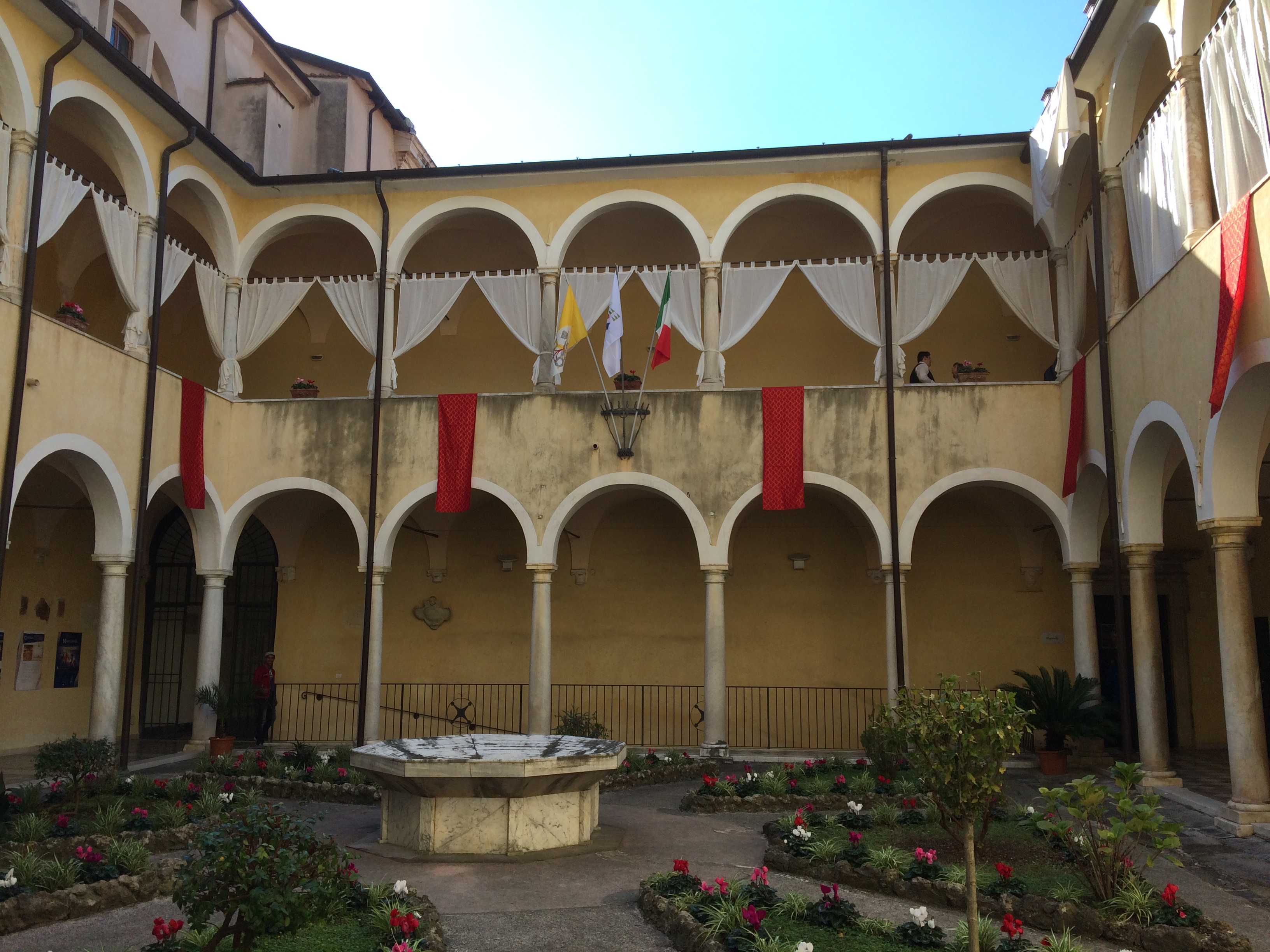 L'antico Chiostro che collega il Seminario alla Cattedrale.